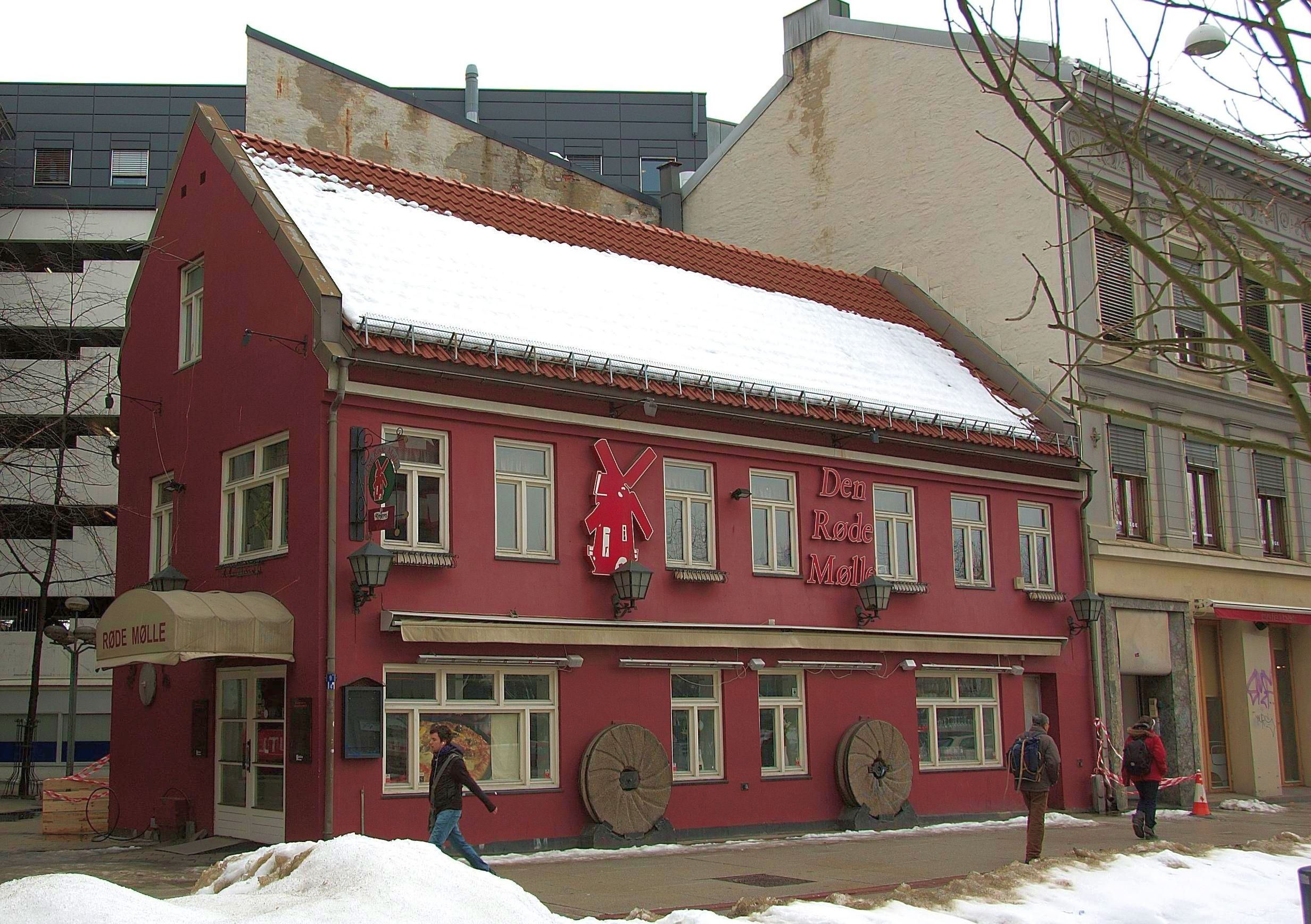 Brugata 9 i Oslo. Restaurant Den Røde Mølle